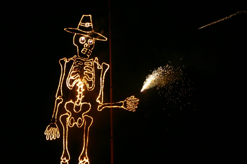 Guy Fawkes effigy